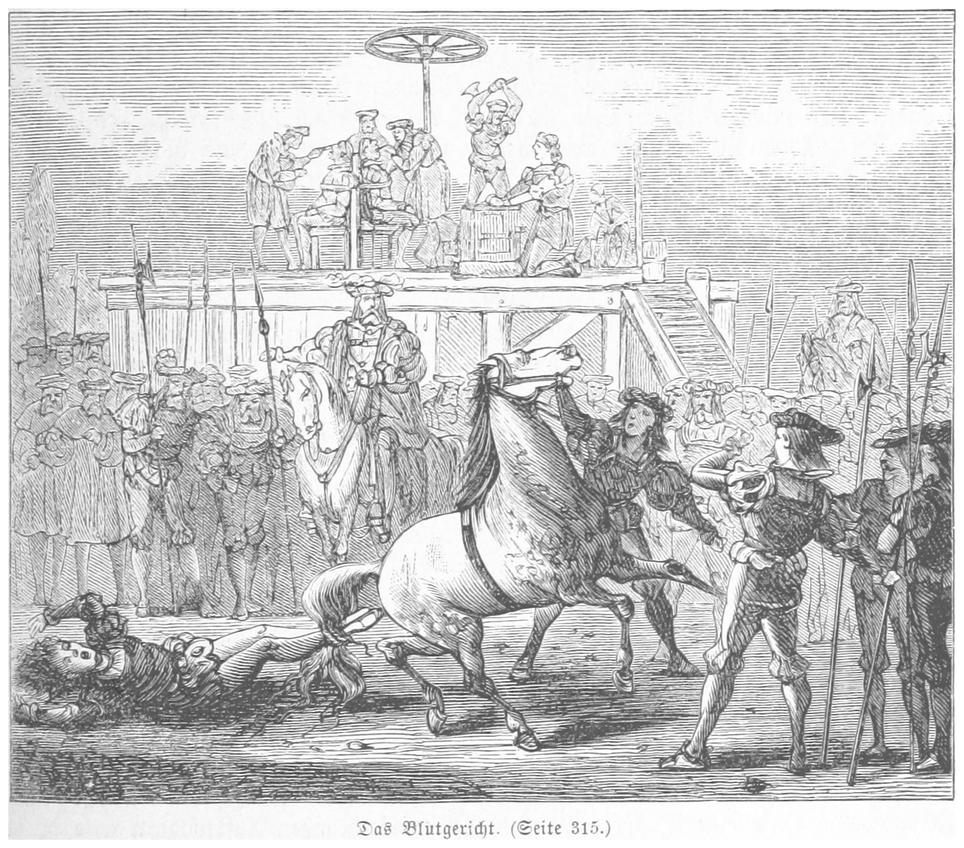 Am 9. Februar 1310 fand auf dem Richtplatz dr Stadt Wien ein öffentliches Strafgericht statt, bei dem Herzog Friedrich zur Abschreckung der Bürgerschaft einige Gefangene exekutieren ließ. So wurde der Wiener Bürger Johann Sadelhauer an ein Pferd gebunden und durch die Gassen der Stadt geschleift, um abschließend mit dem Rad getötet zu werden. Weitere aufrührerische Bürger wurden geblendet oder verstümmelt.